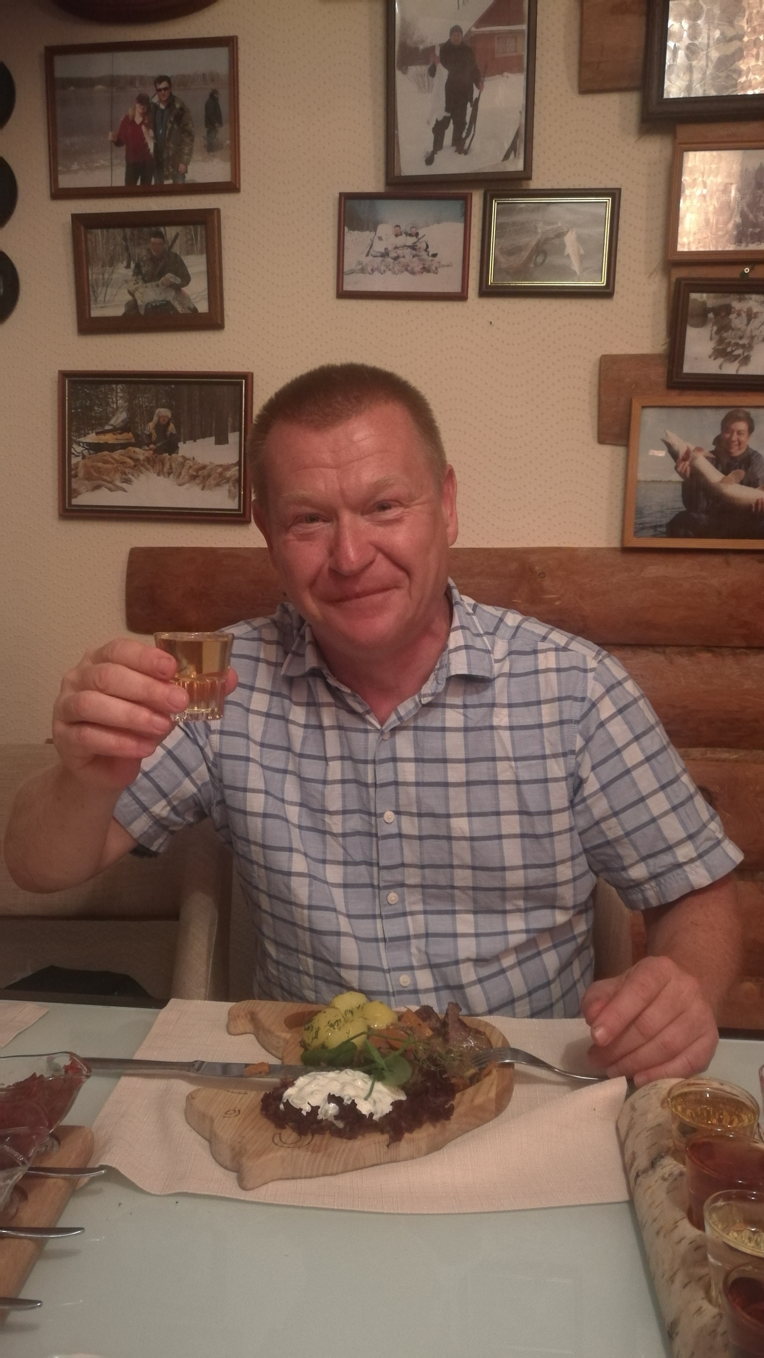 Pola esperantisto Mirek Dziedzic en restoracio Ĉum. Tjumeno, Rusio.